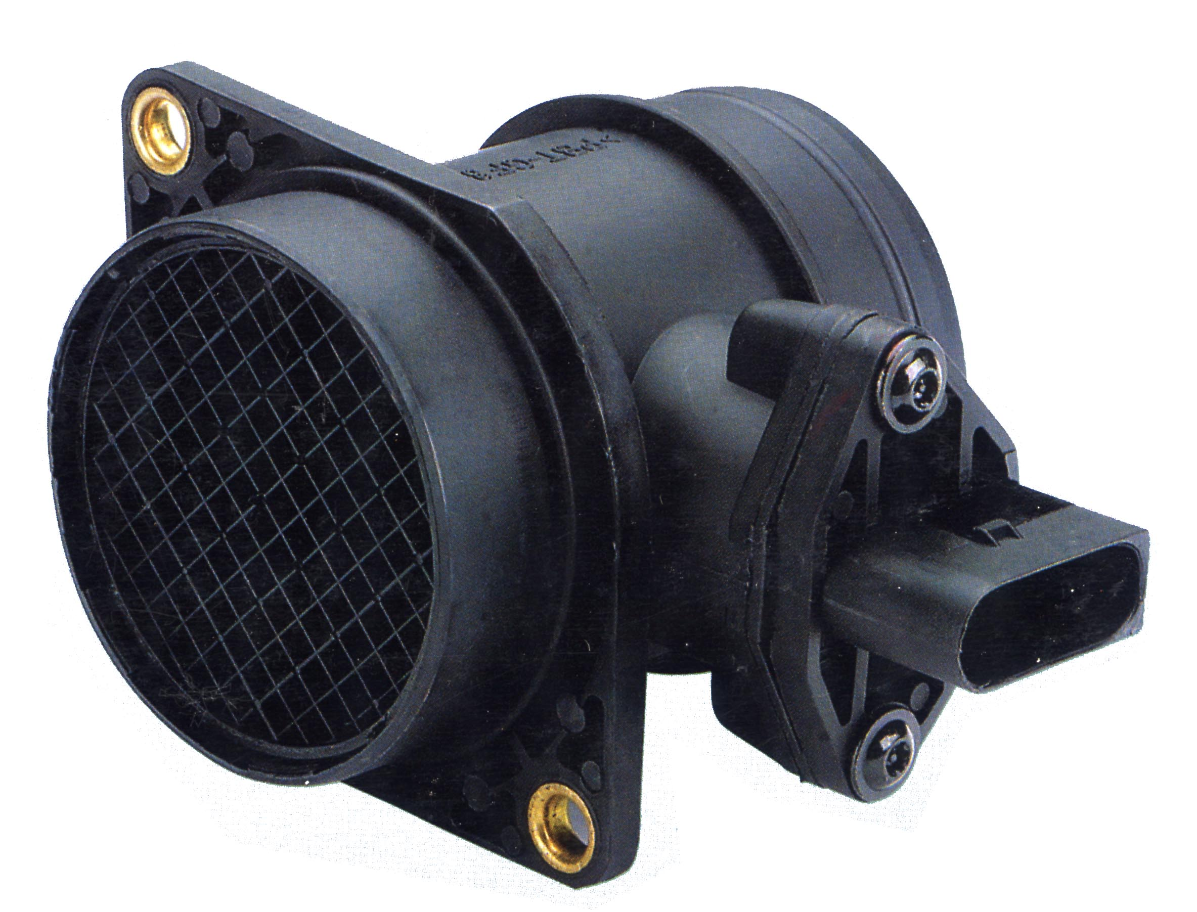 Luftmassenmesser im Ansaugtrakt von Verbrennungsmotoren